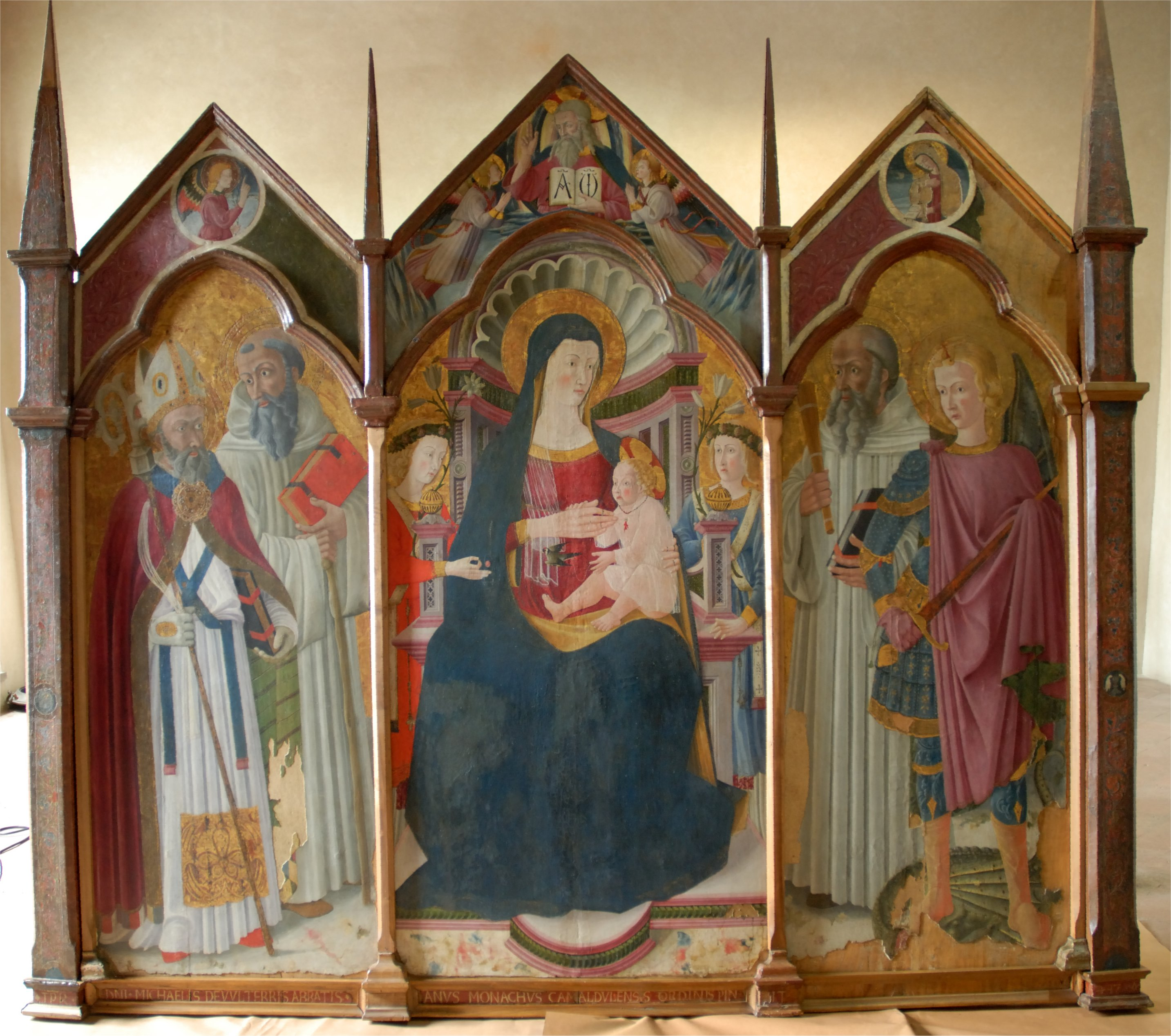 Madonna tra Santi. Proveniente dall'Abbazia di San Martino a Tifi.